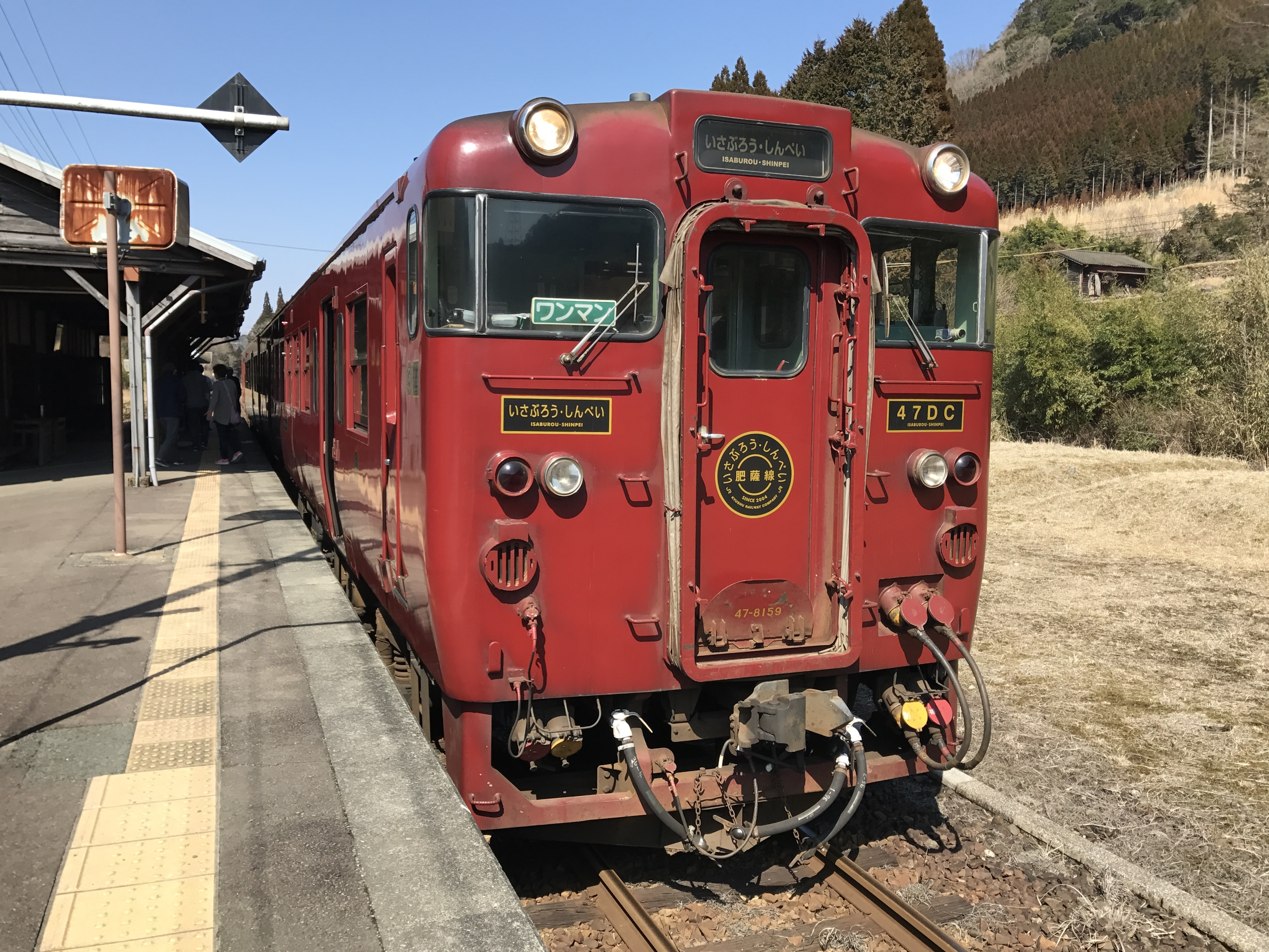 矢岳駅にて停車中の特急「いさぶろう・しんぺい」